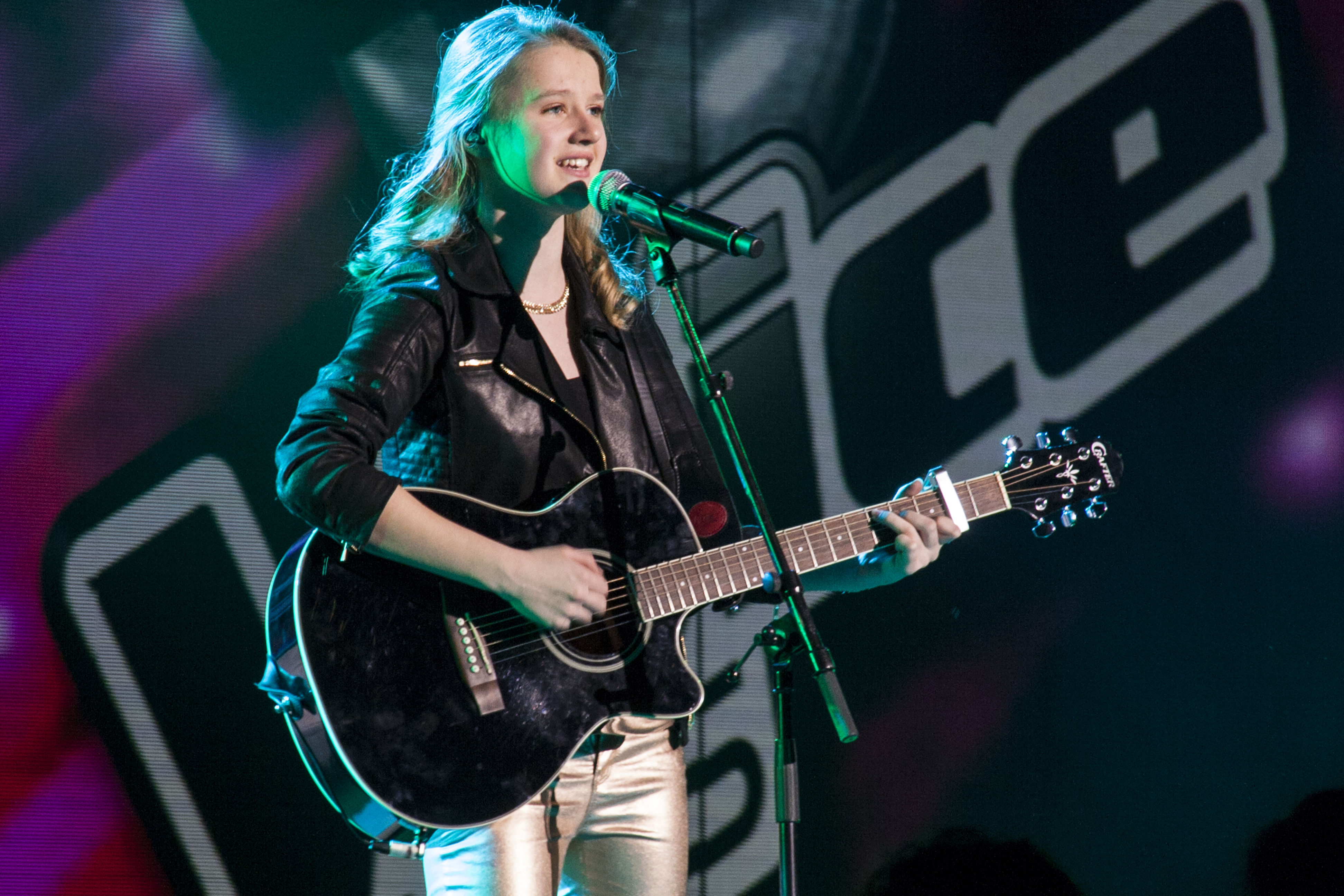 Laura van Kaam tijdens The Voice Kids on Tour in Studio 21 in Hilversum.